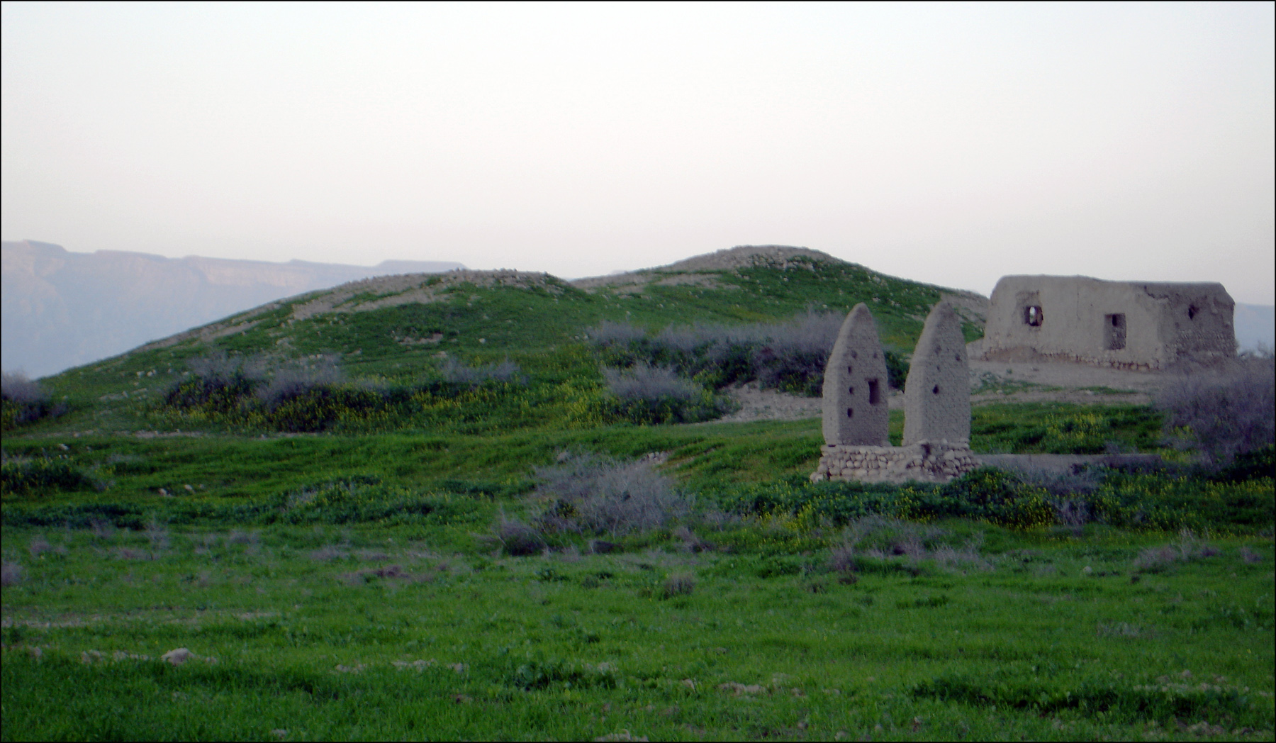 تل باستانی جت، شهر علامرودشت، جنوب استان فارس